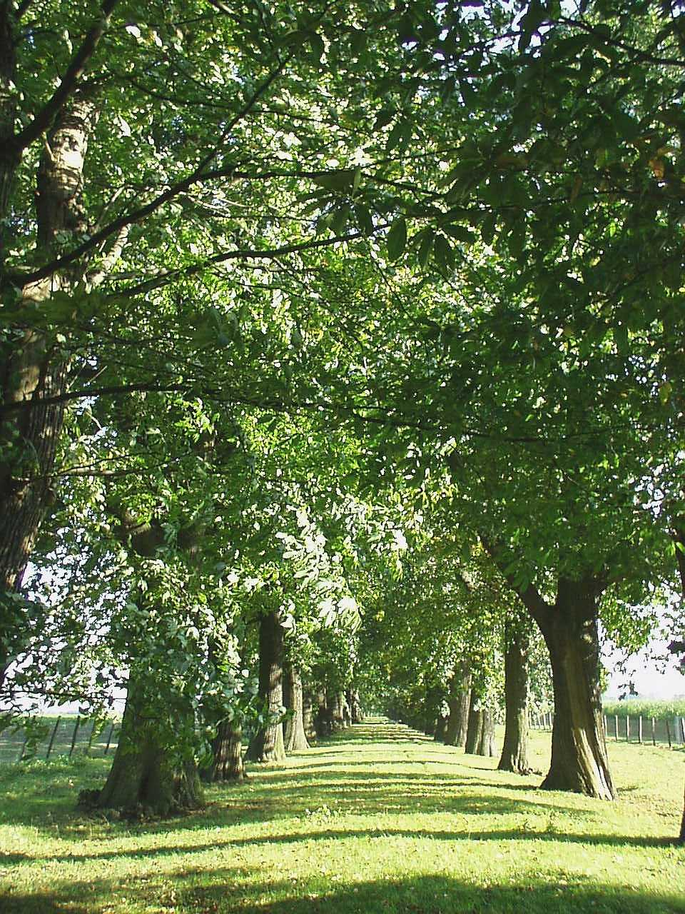 Eßkastanien-Alle, ehem. Zufahrt zum Schloss Dyck, prägnanter Teil der Landesgartenschau von Neuss